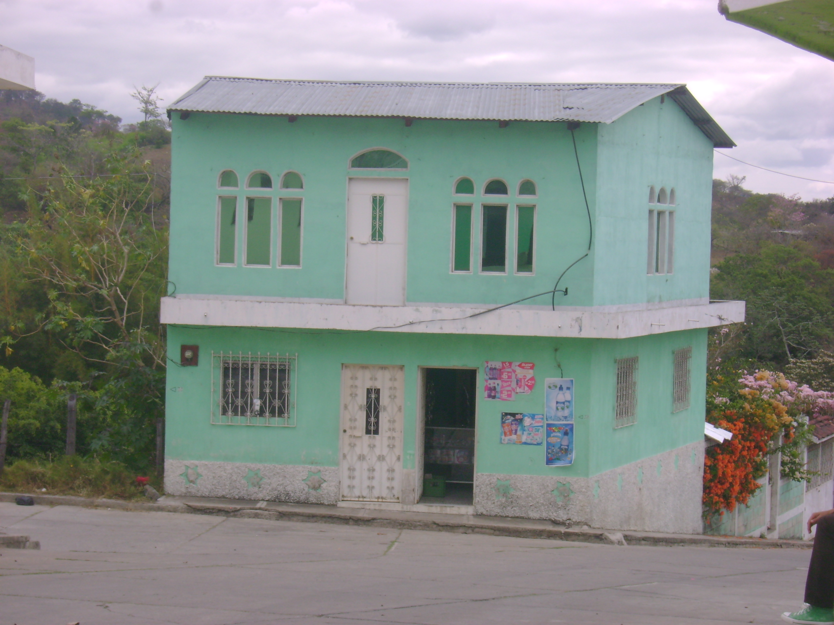 calles de pachalum